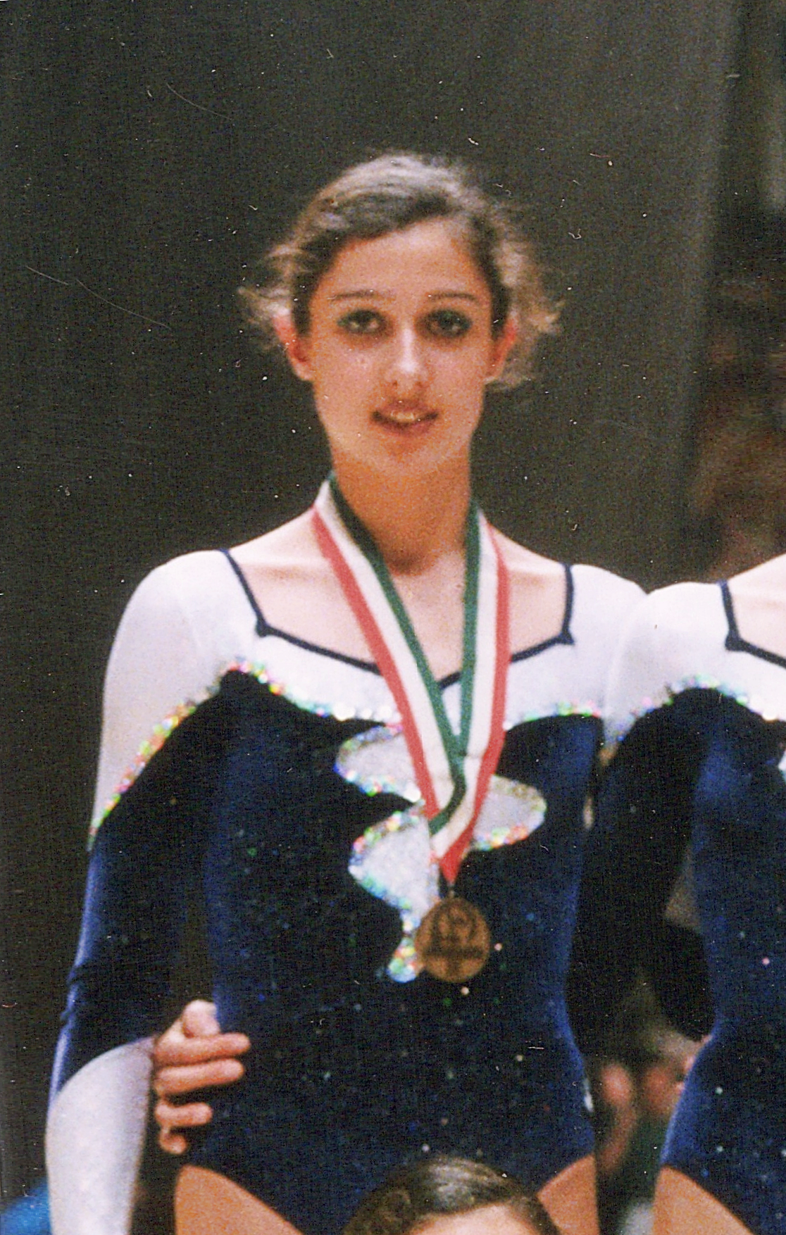 Beatriz Nogales en 1999 con la medalla de bronce en el Europeo de Budapest.